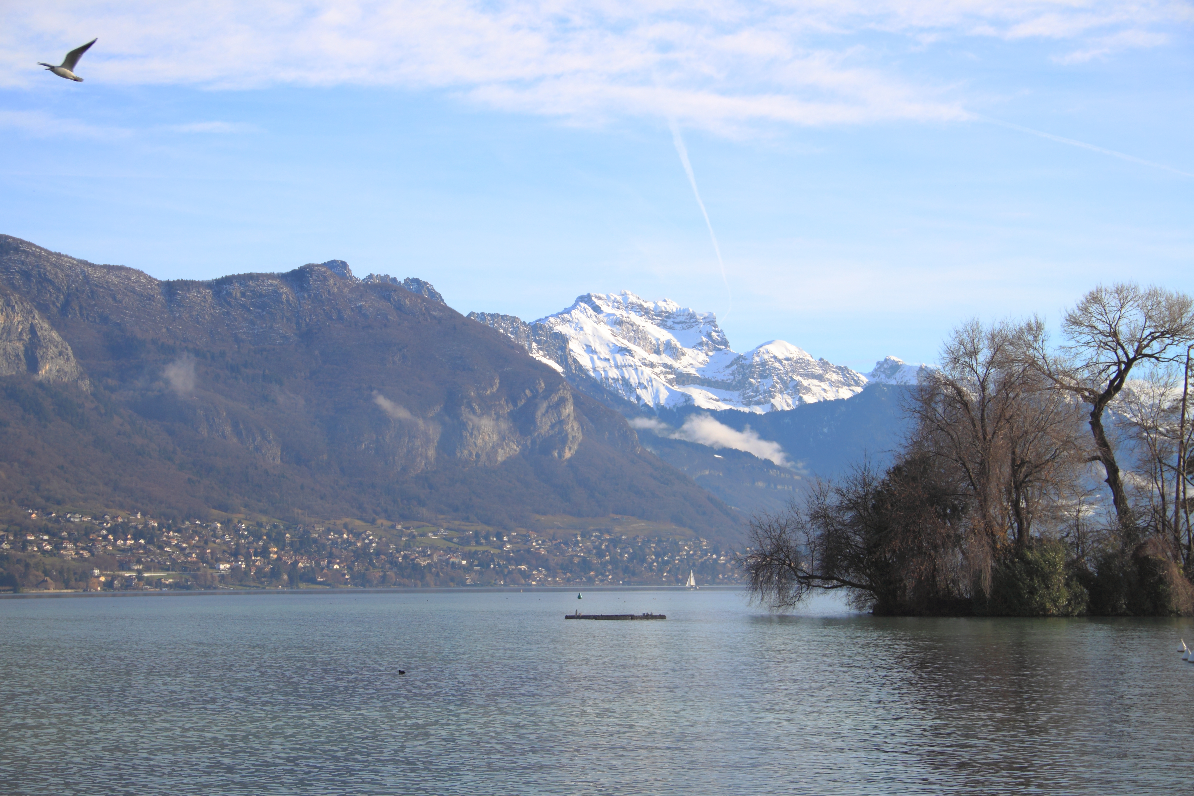 île aux cygnes sur le lac d'Annecy